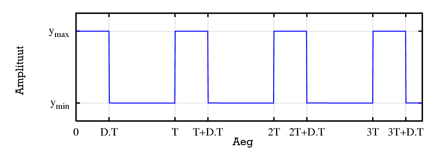 Tavaline kastsignaal.